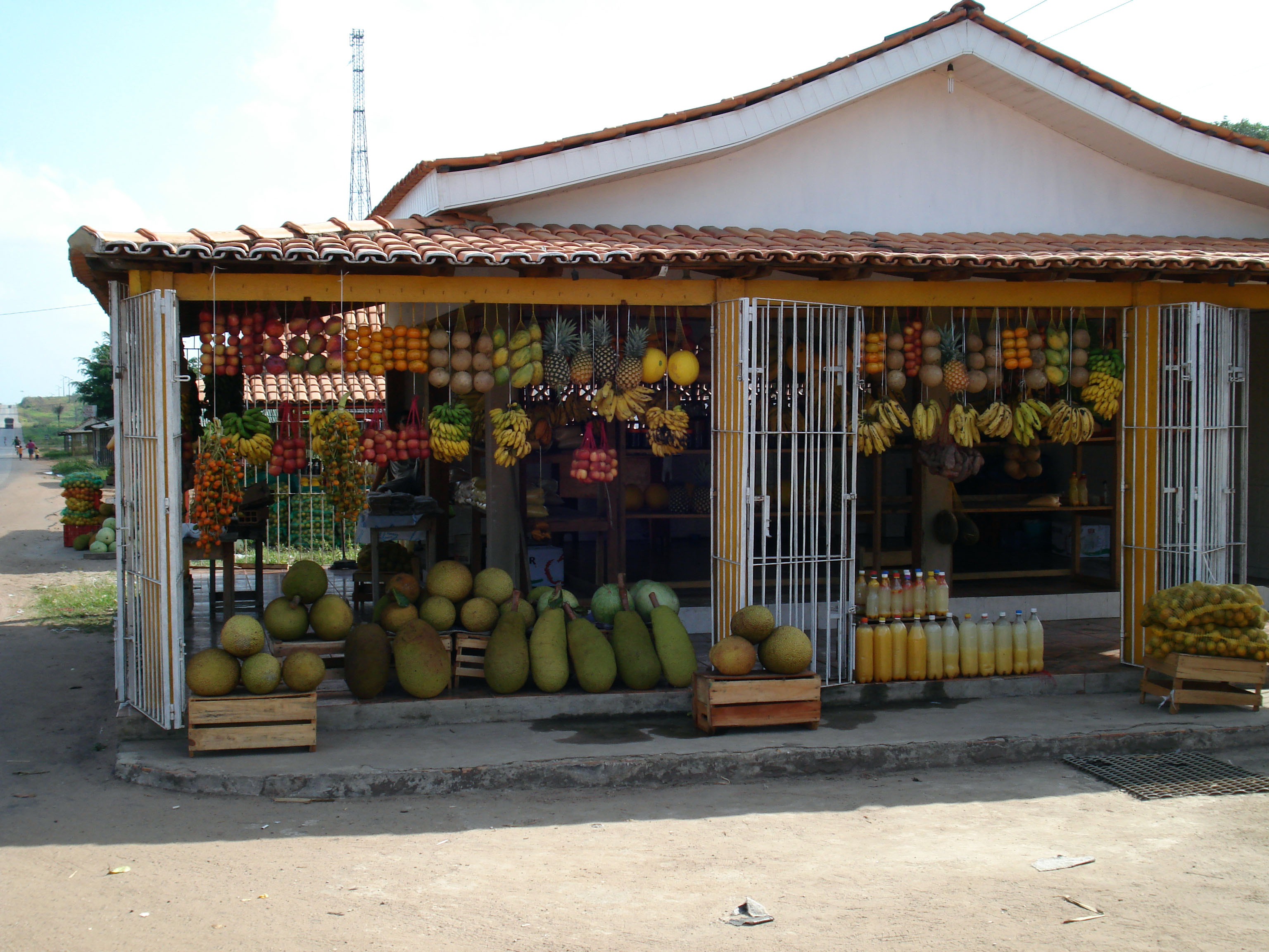 Barraca de frutas rodovia BR-316, Santa Maria do Pará, Estado do Pará, Brasil Own Work 12.22.2206